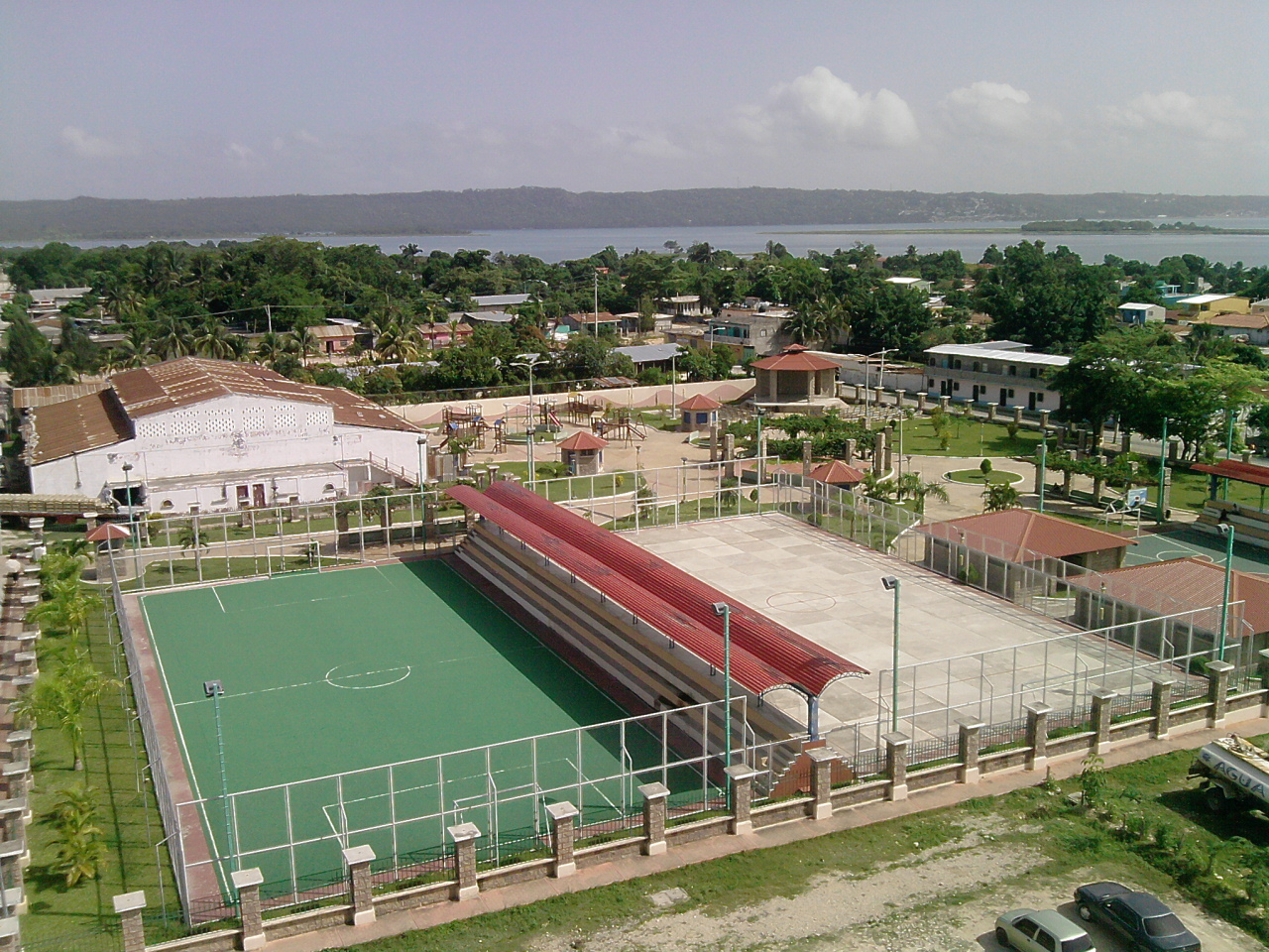 Fotografía tomada desde la Municipalidad de San Benito.